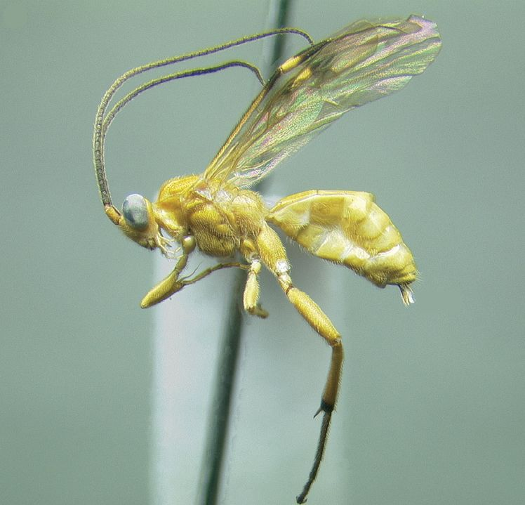 Coccygidium sp.